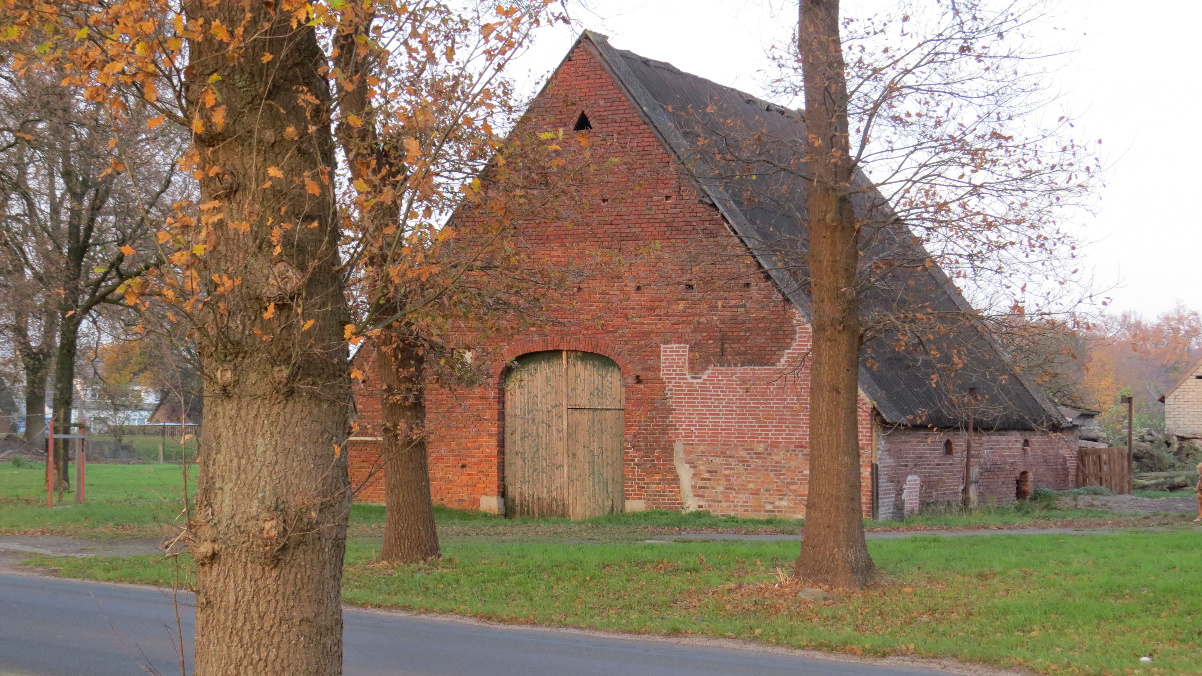 Amerikastr. 5 in Garrel